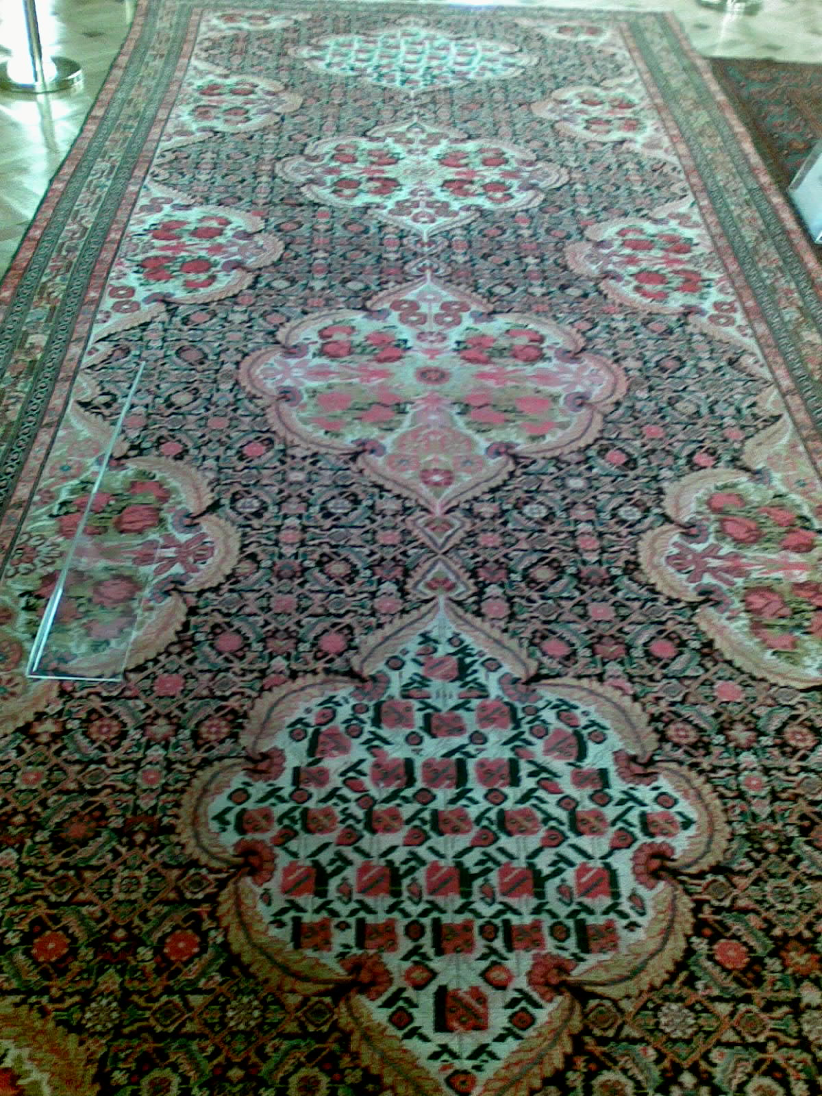 Carpet belong Karabakh khans, Azerbaijan History Museum